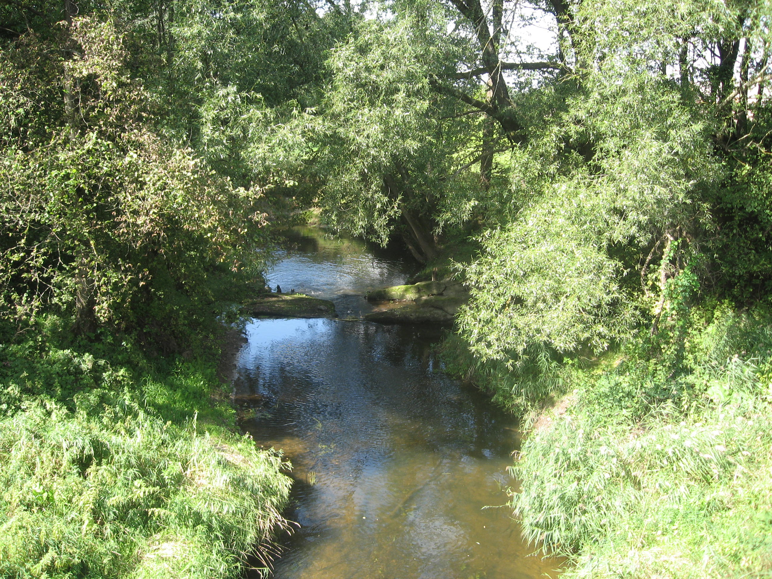 Geležinkelio liekanos